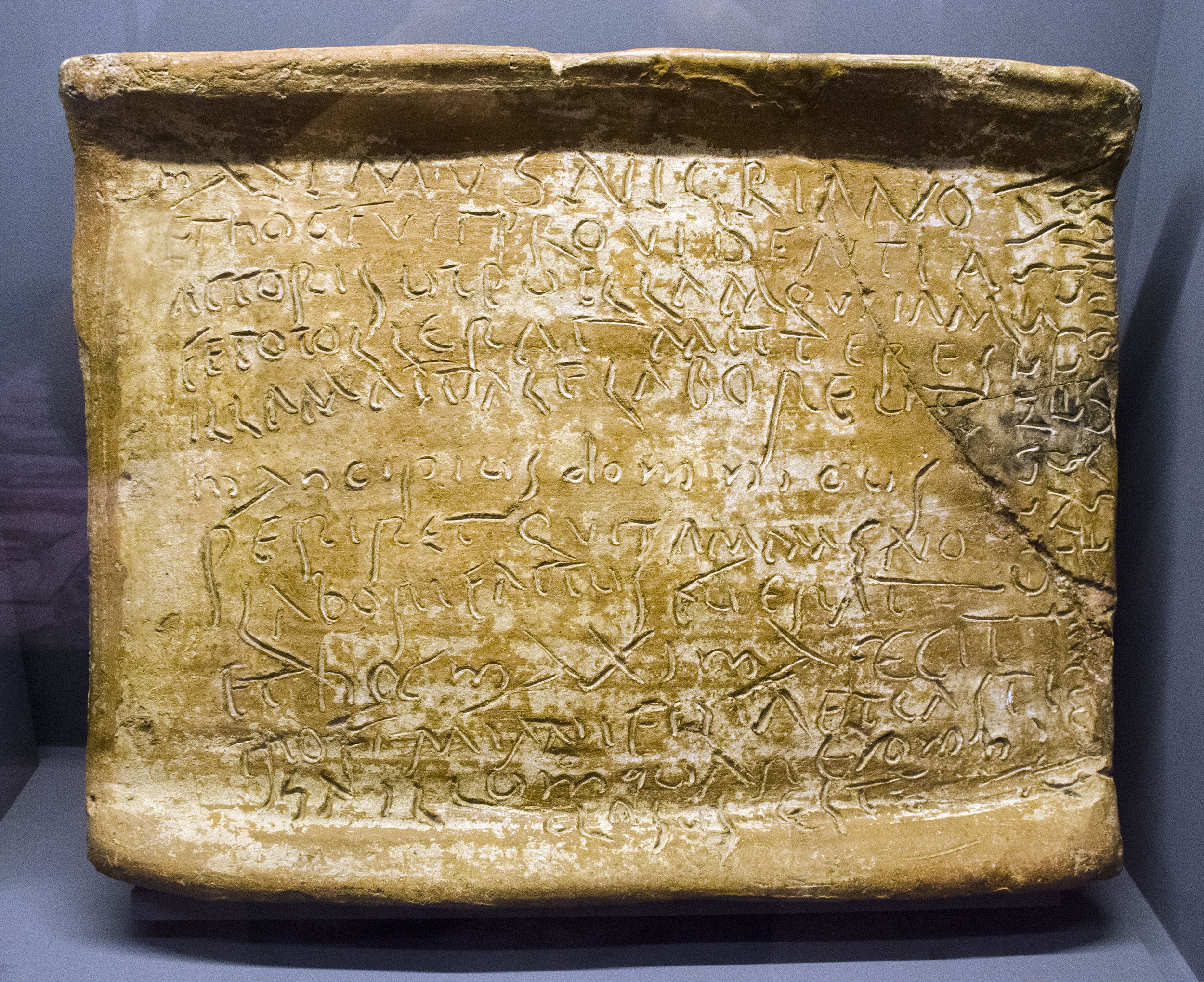 Procede de Villafranca de los Barros, Badajoz, y está datada en el siglo III d.C. Es una carta personal sobre teja cuyo texto y traducción pueden verse en la ficha CERES del objeto, número 1954/30/1 de inventario en el Museo Arqueológico Nacional).